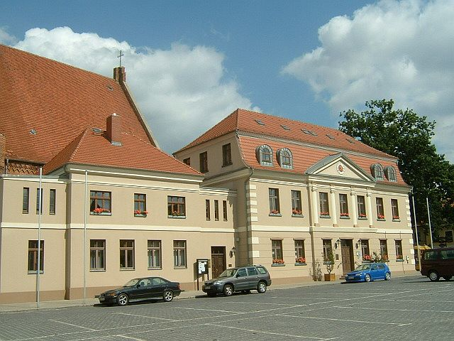 Rathaus in Röbel am Marktplatz